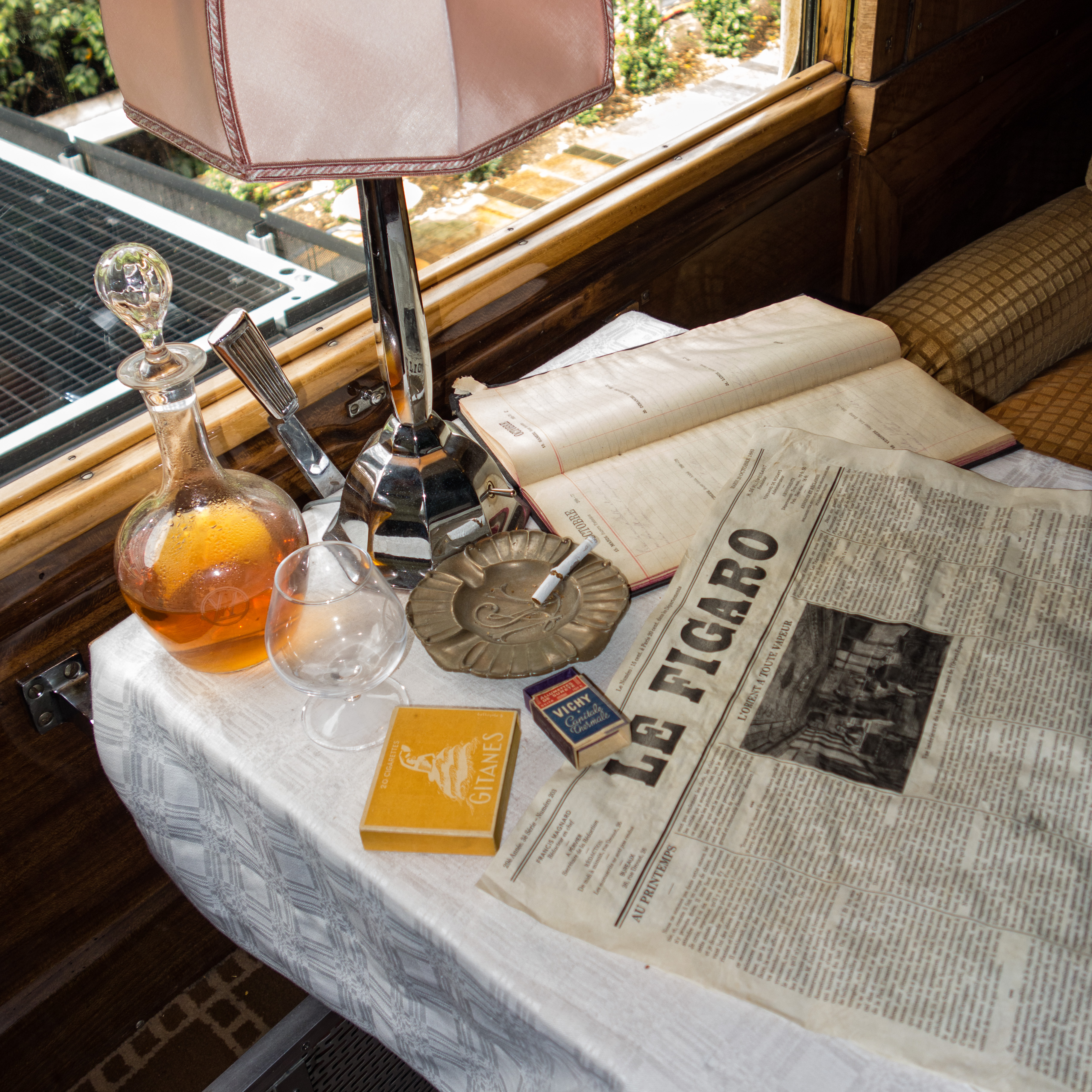 Fine du Bugey dans l'Orient-Express